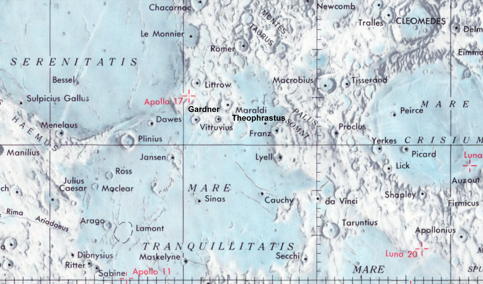 Cráter lunar Theophrastus. Localización. (Lunar Chart LPC1. Second Edition)